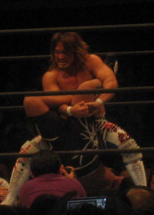 2013年11月9日 大阪府立体育会館 「POWER STRUGGLE」 石井智宏にテキサスクローバーホールドを極める棚橋弘至